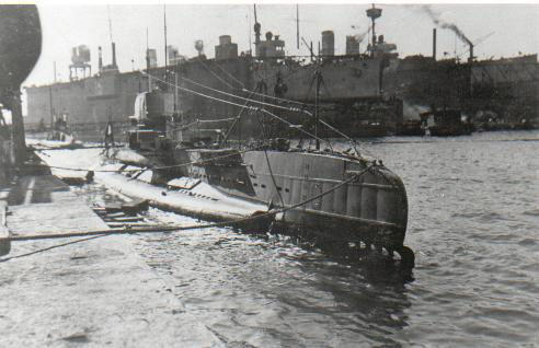 German UBoat U27 Sunk 19 August 1915